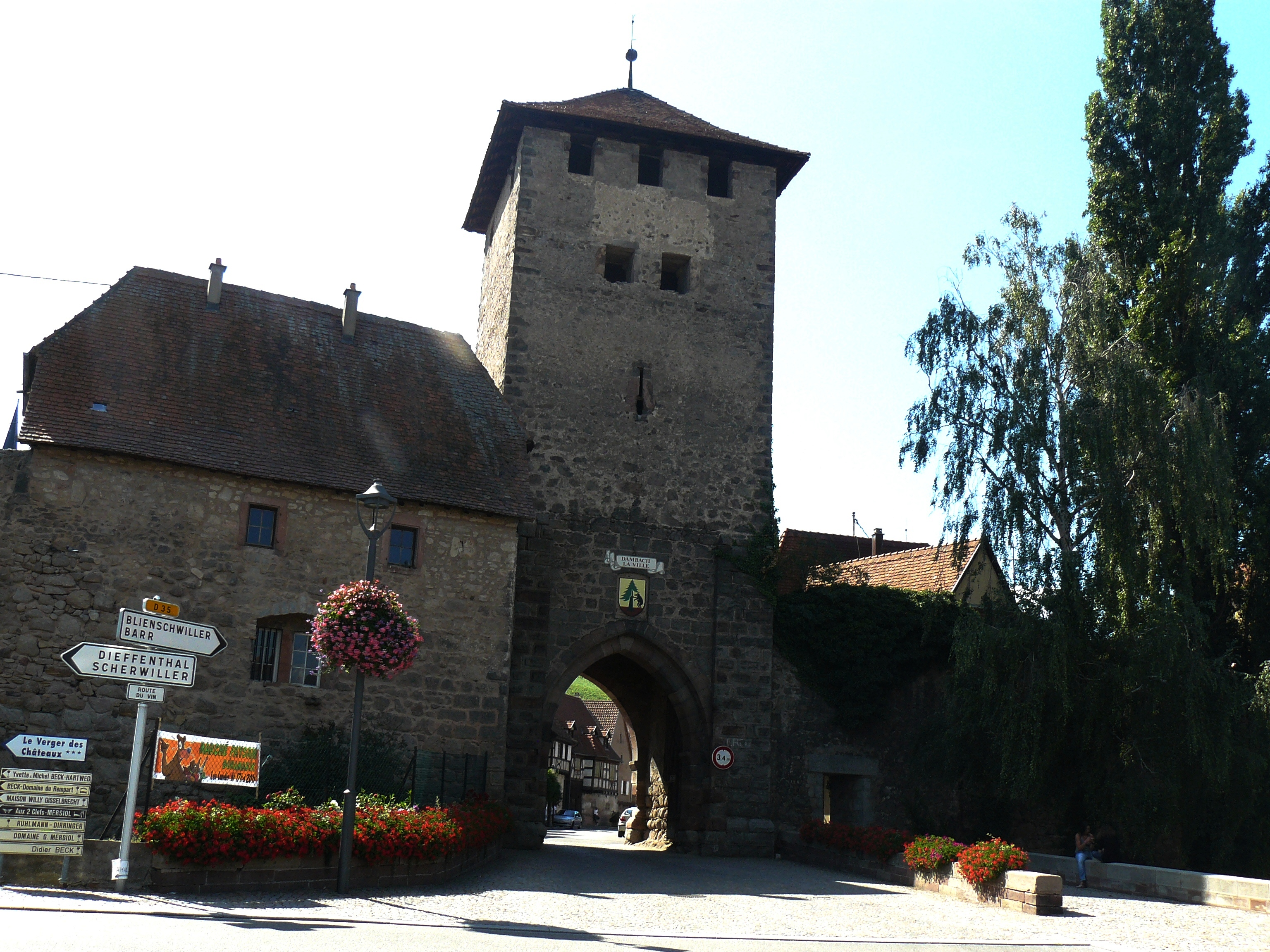 Tour-Porte d'Ebersheim (1325-1350)